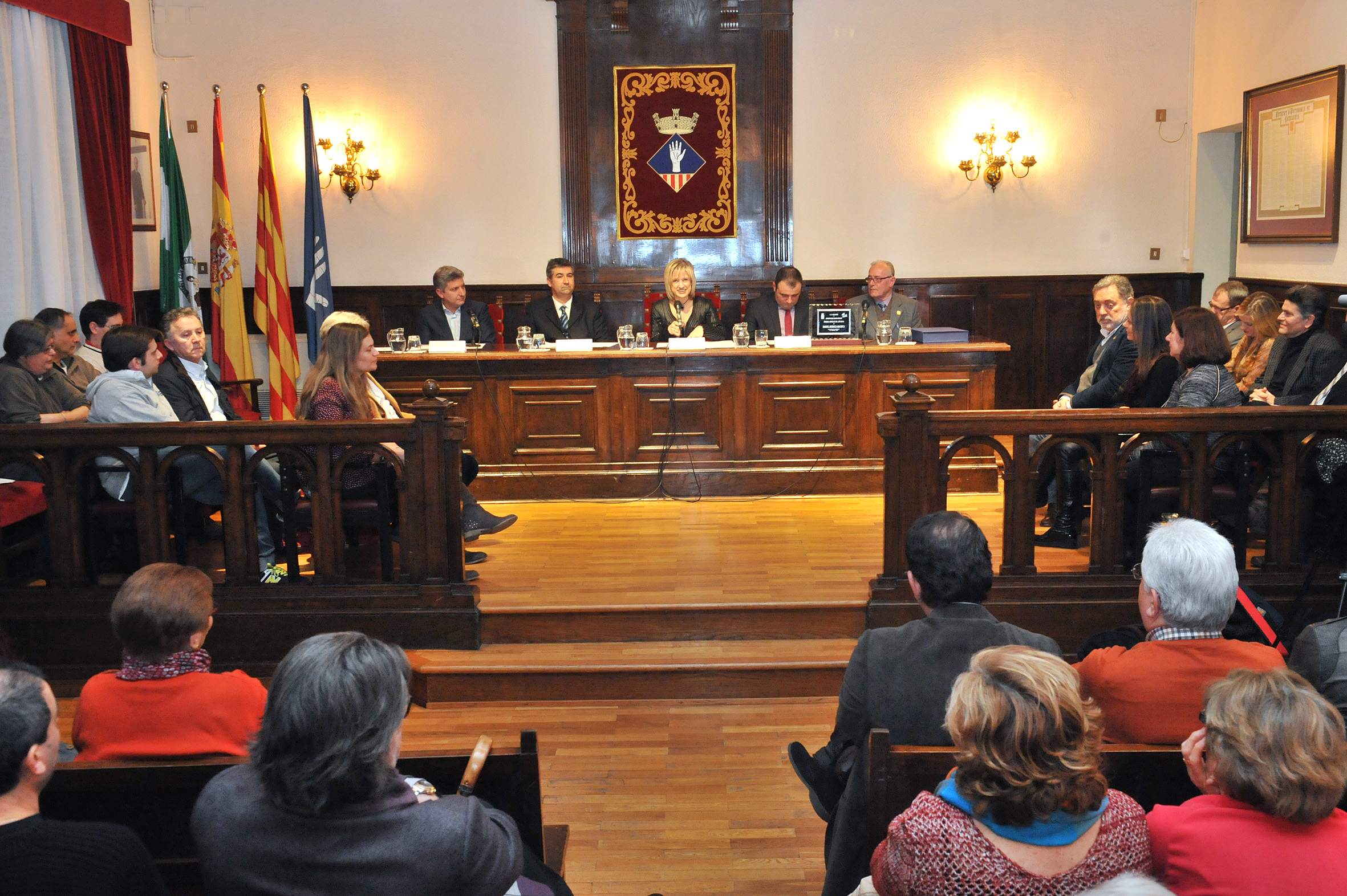 Andalús de l'Any